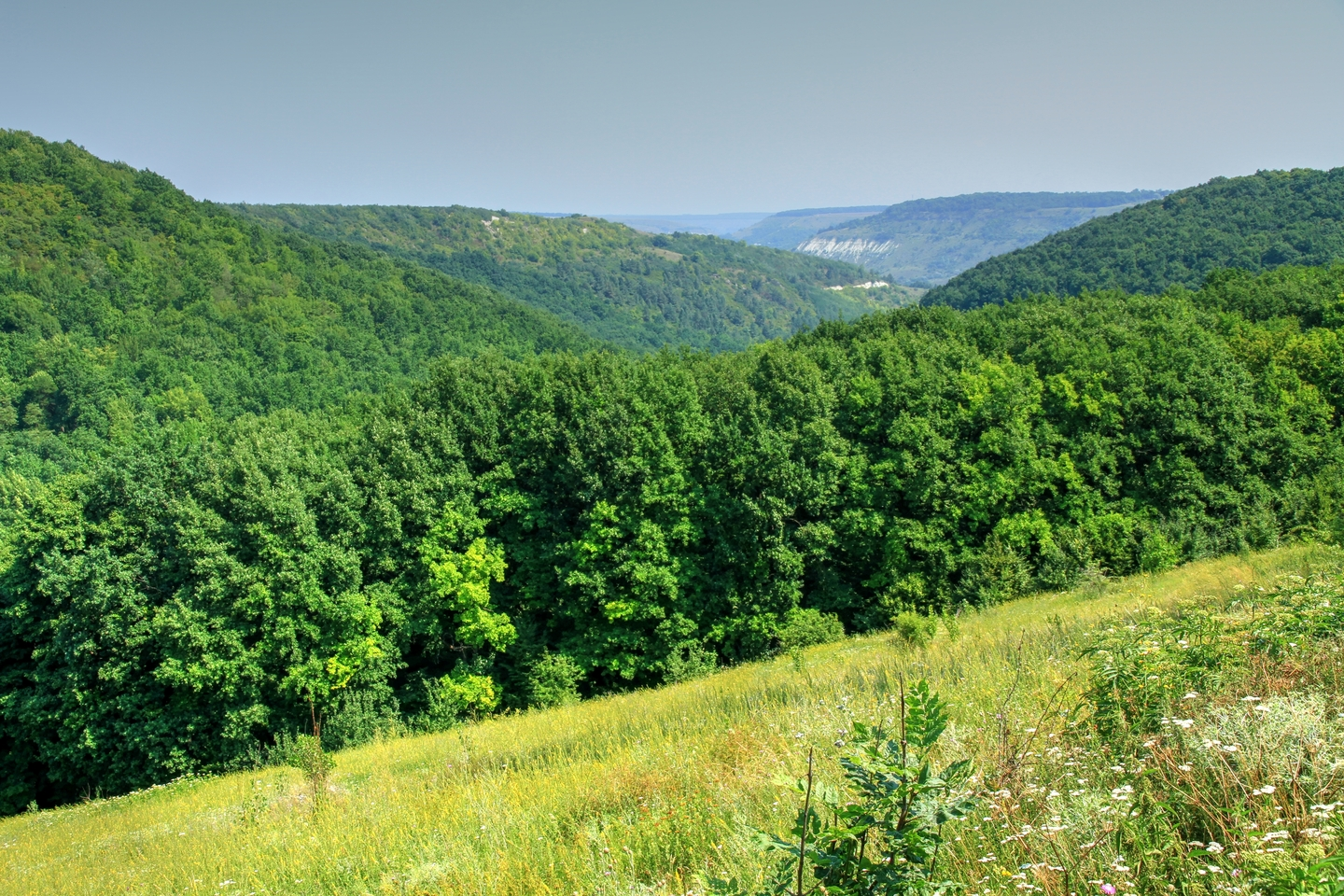 Рудь-Арионешть, монумент природы, находится в Дондушенский район, В 10 км от Отачь по течению р. Днестр, Отачское лесничество, урочище Арионешть-Стынка, кварталы 20-22; урочище Рудь-Гаван, кварталы 23-29 (код MD-DN-rp-017)